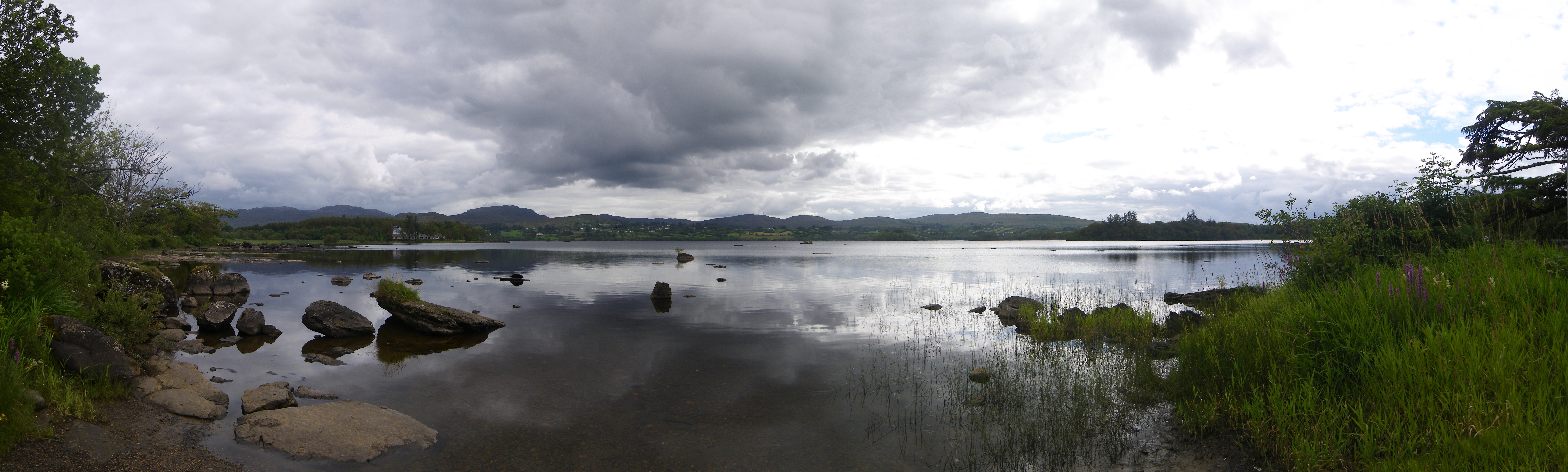 Vue du Lough Eske pres de Harvey's Point, Donegal, Irlande